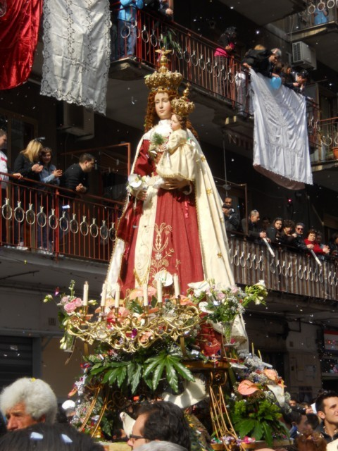 Foto scattata a Pagani durante la processione della Madonna delle Galline.